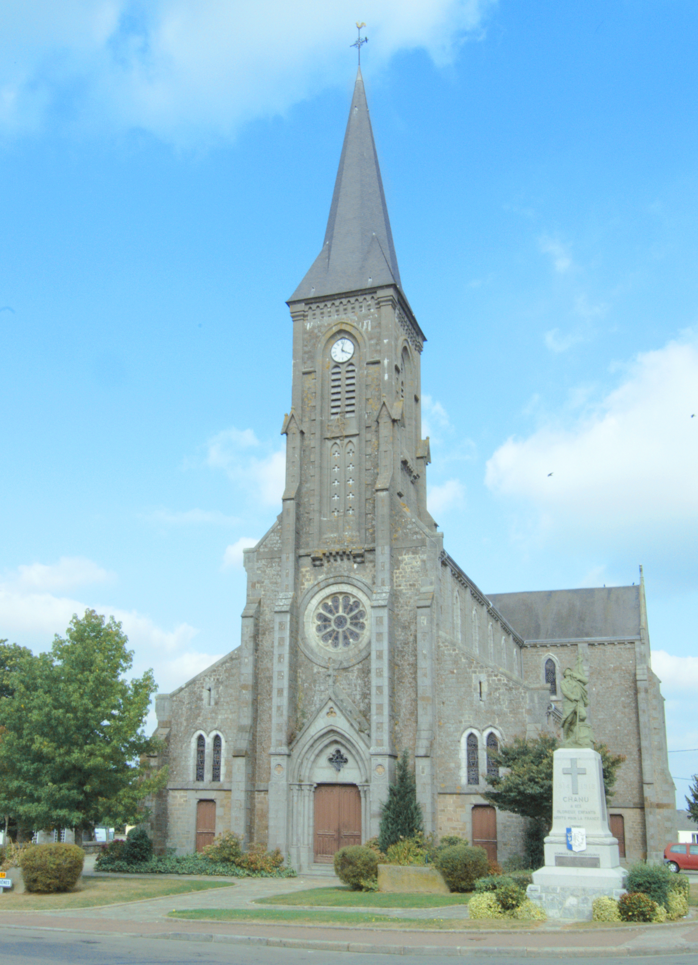 L'église Saint-Martin à Chanu dans le département de l'Orne.